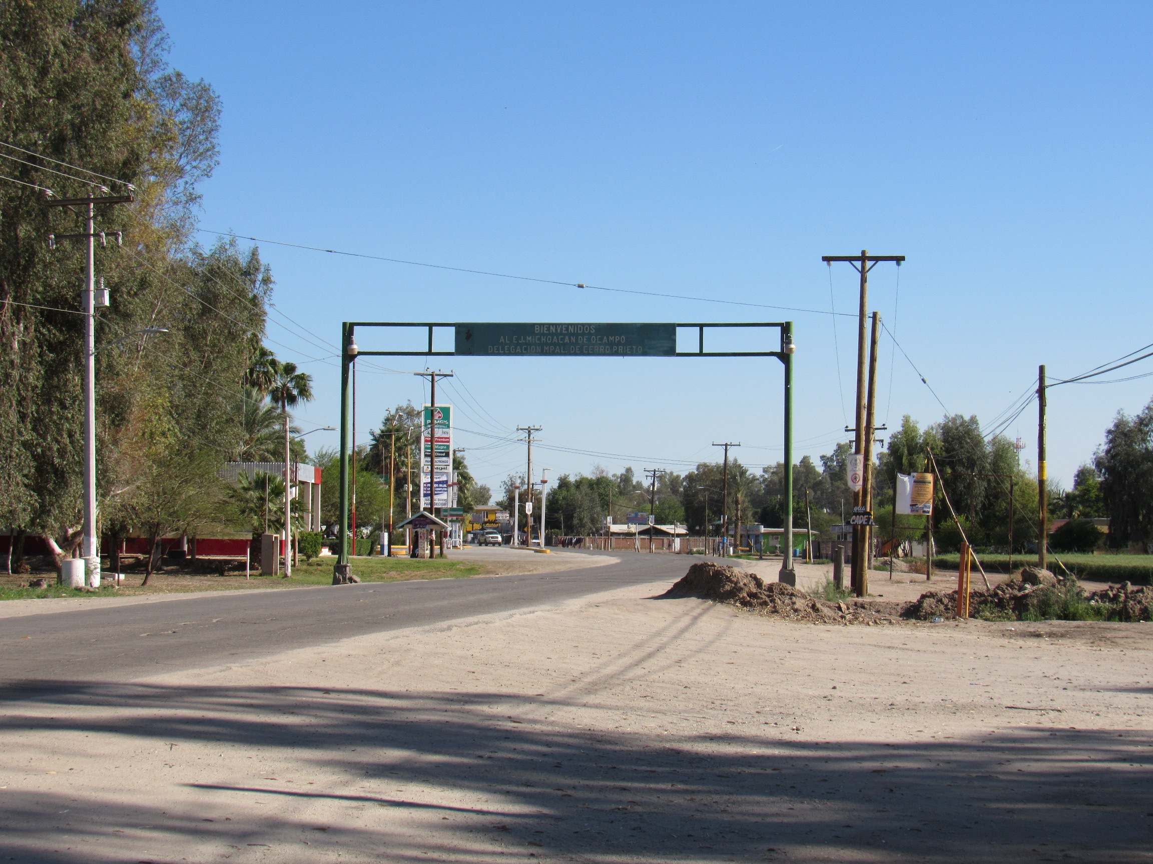 Acceso principal por la carretera estatal No. 2. Este es el acceso por la parte norte del poblado.